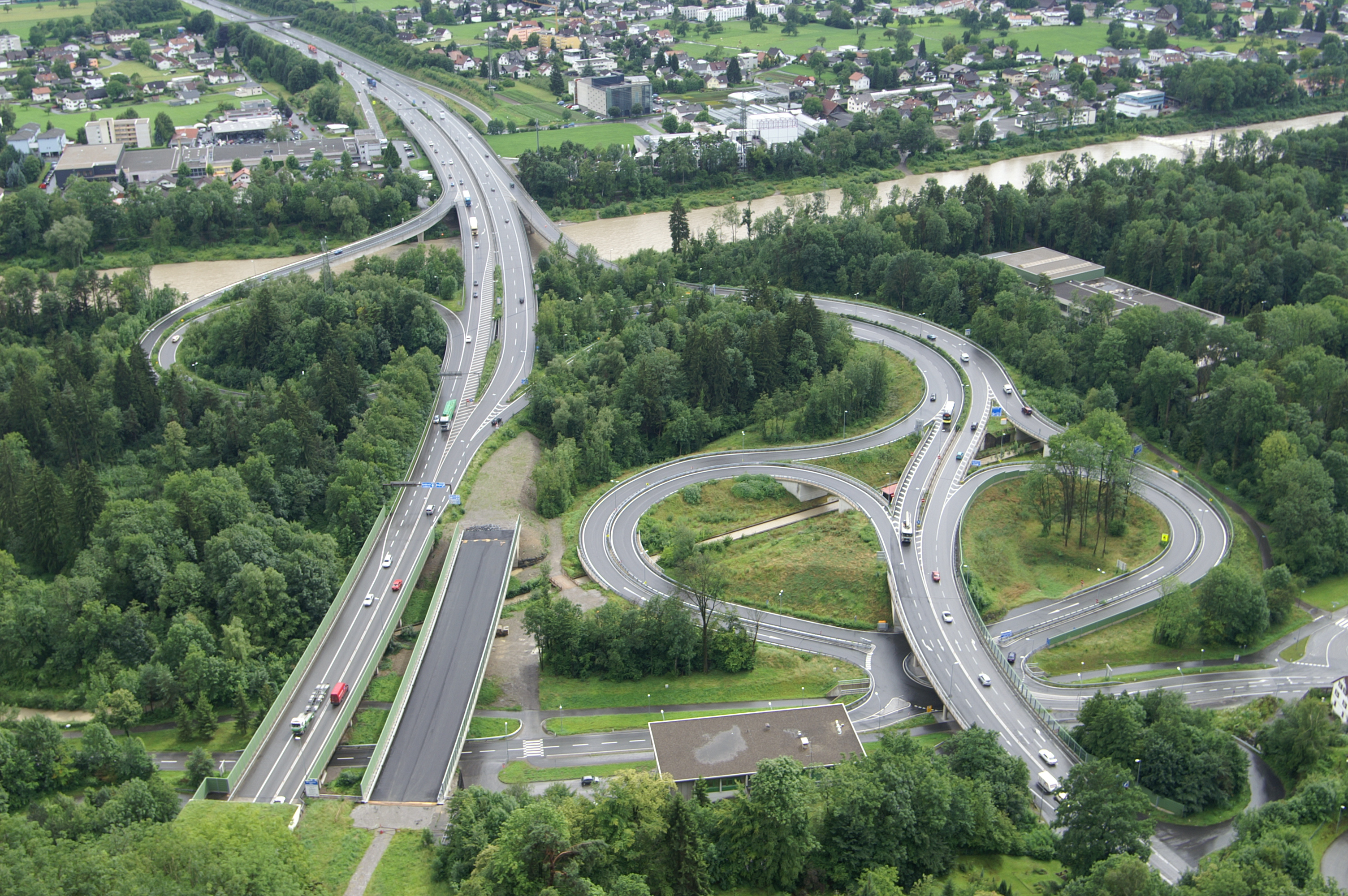 Die österreichische Rheintal/Walgau Autobahn (A14). Verkehrsknoten Weidach bei Bregenz noch vor der Eröffnung der zweiten Tunnelröhre des Pfändertunnels (im Bild gerade im Bau). Aus- bzw. Einfahrt zum Pfändertunnel im Bild links unten sowie zum Citytunnel im Bild rechts unten. Im Hintergrund die Bregenzerache; Blick von der Burg Hohenbregenz auf dem Gebhardsberg.